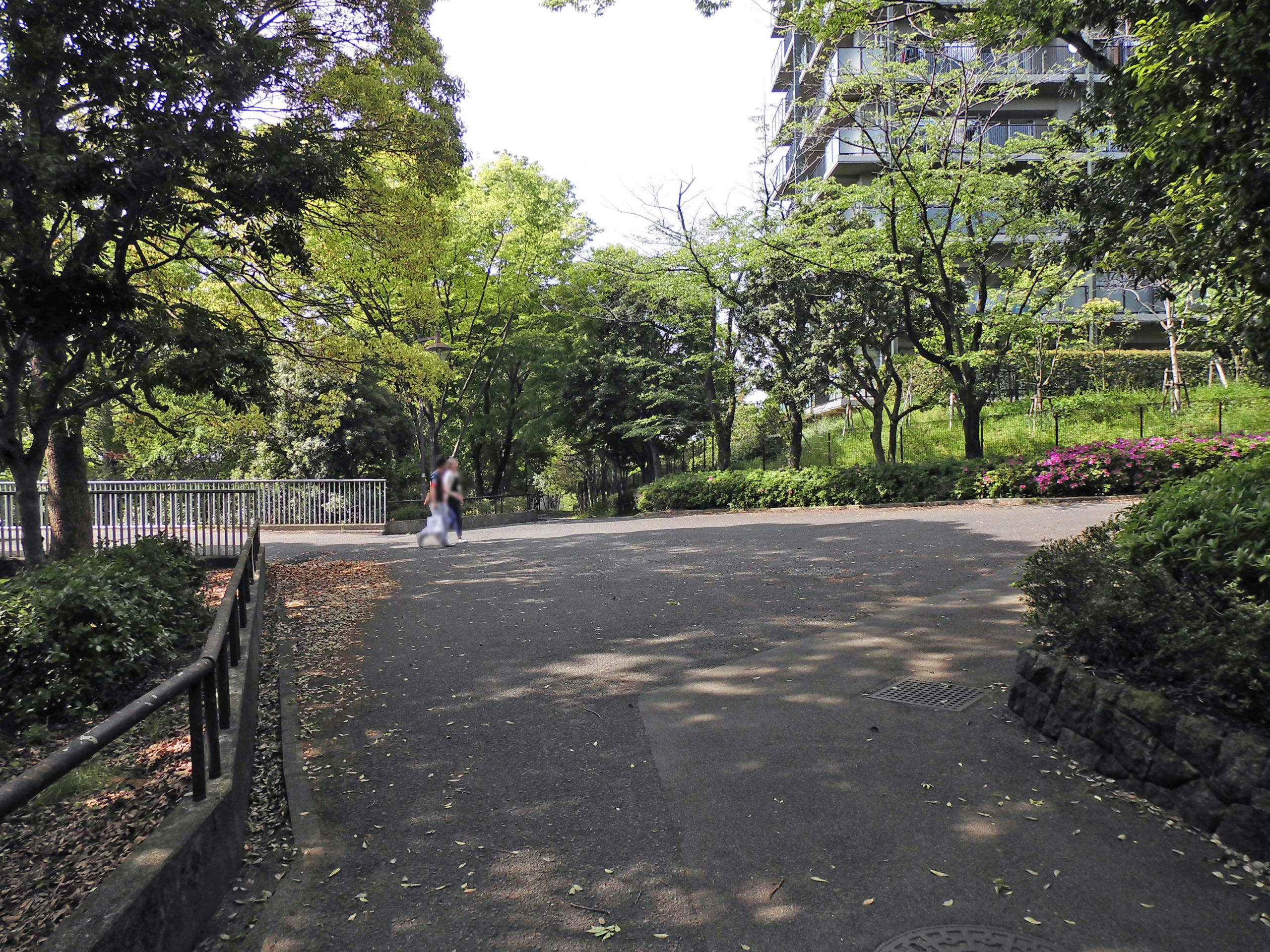 多摩ニュータウンで網の目のように整備された遊歩道同士の交差箇所